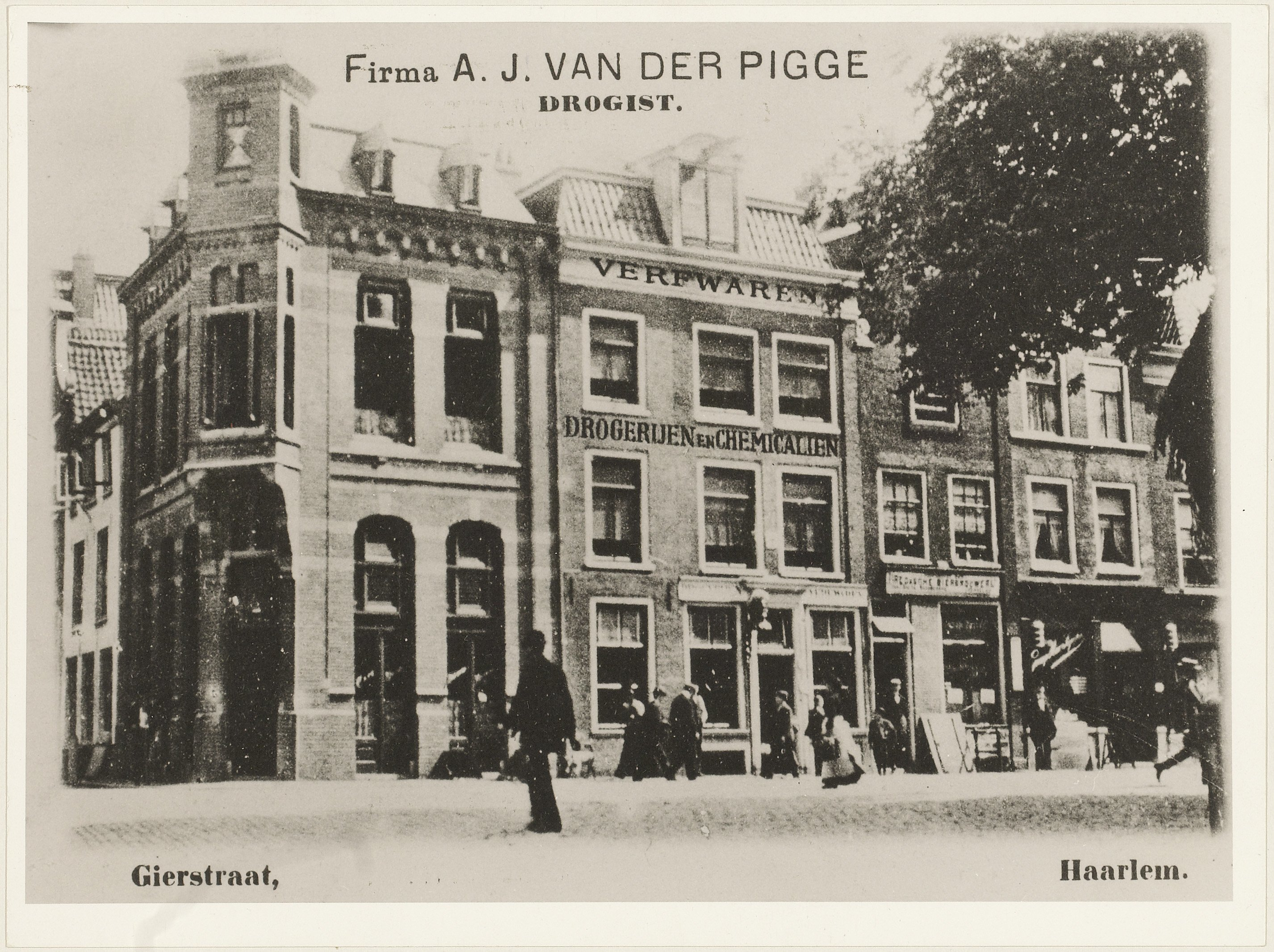 Reproductie van prentbriefkaart. Gierstraat 1-9, ziende vanaf de Gedempte Oude Gracht naar het westen. V.l.n.r.: Gierstraat 1, café Jac. Schuitevoerder; Gierstraat 3, drogisterij A.J. van der Pigge; Gierstraat 7, bierhuis J. Verheyen en Gierstraat 9, Manufacturen Th. Heyligers.